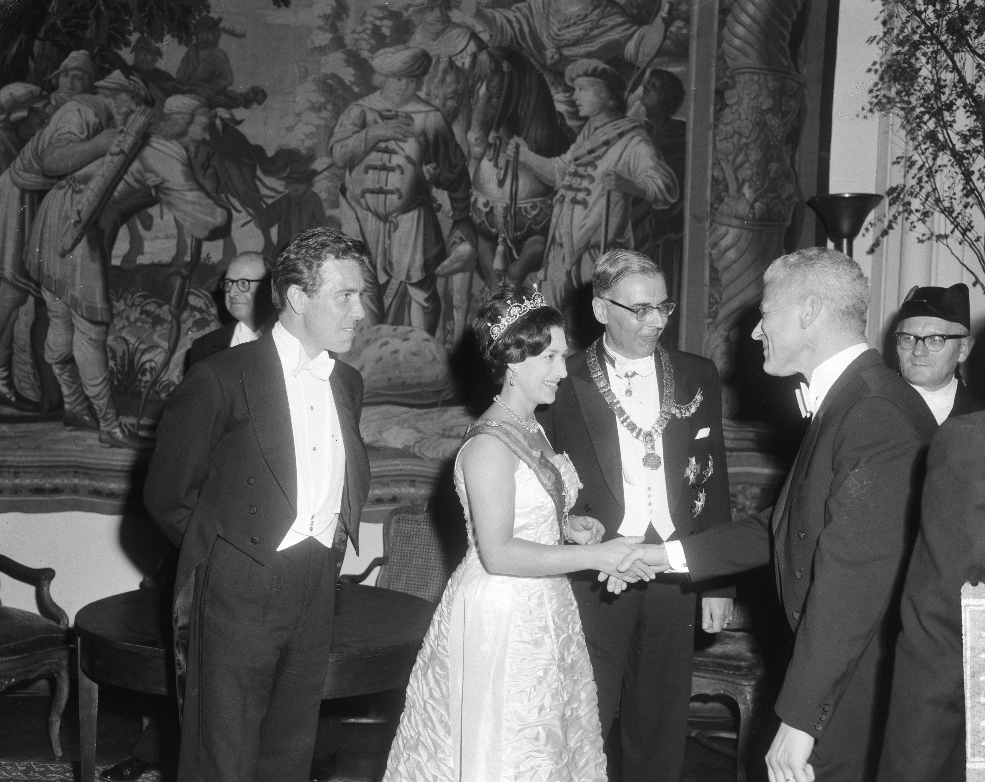 Collectie / Archief : Fotocollectie Anefo Reportage / Serie : [ onbekend ] Beschrijving : Prinses Margaret en Lord Snowdon door Amsterdams gemeentebestuur in Rijksmuseum ontvangen, v.l.n.r. Lord Snowdon , Prinses Margaret , burgemeester Van Datum : 14 mei 1965 Locatie : Amsterdam, Noord-Holland Trefwoorden : burgemeesters, gemeentebesturen, ontvangsten Persoonsnaam : Hall, Gijs van, Margaret, prinses van Groot-Brittannië, Snowdon Lord Fotograaf : Bilsen, Joop van / Anefo Auteursrechthebbende : Nationaal Archief Materiaalsoort : Negatief (zwart/wit) Nummer archiefinventaris : bekijk toegang 2.24.01.04 Bestanddeelnummer : 917-7747